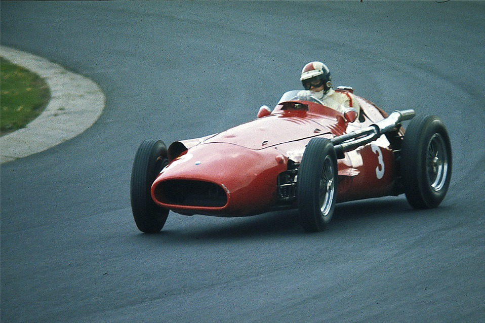 Maserati 250 F, Baujahr 1957